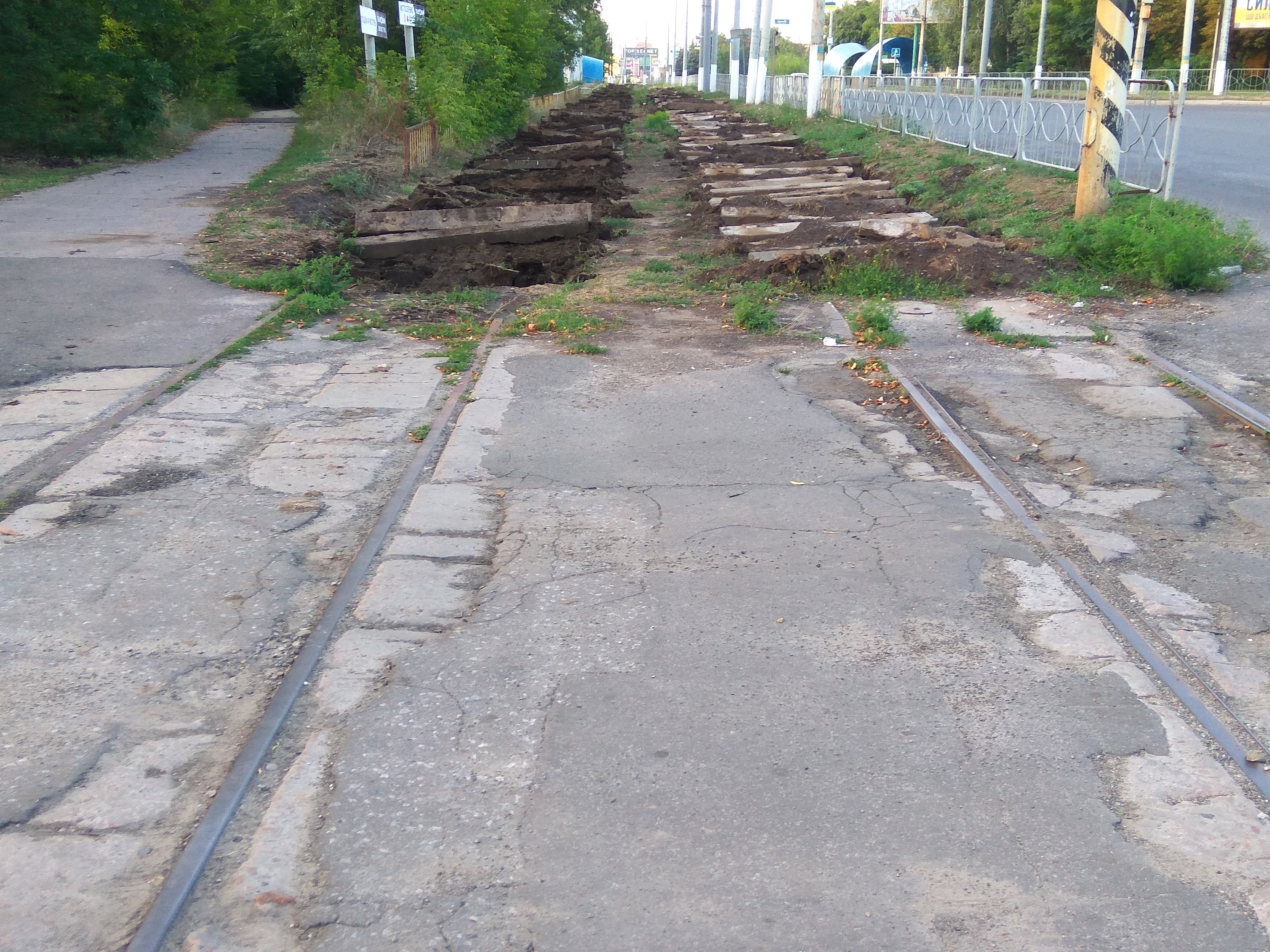 Колишні трамвайні колії у Краматорську